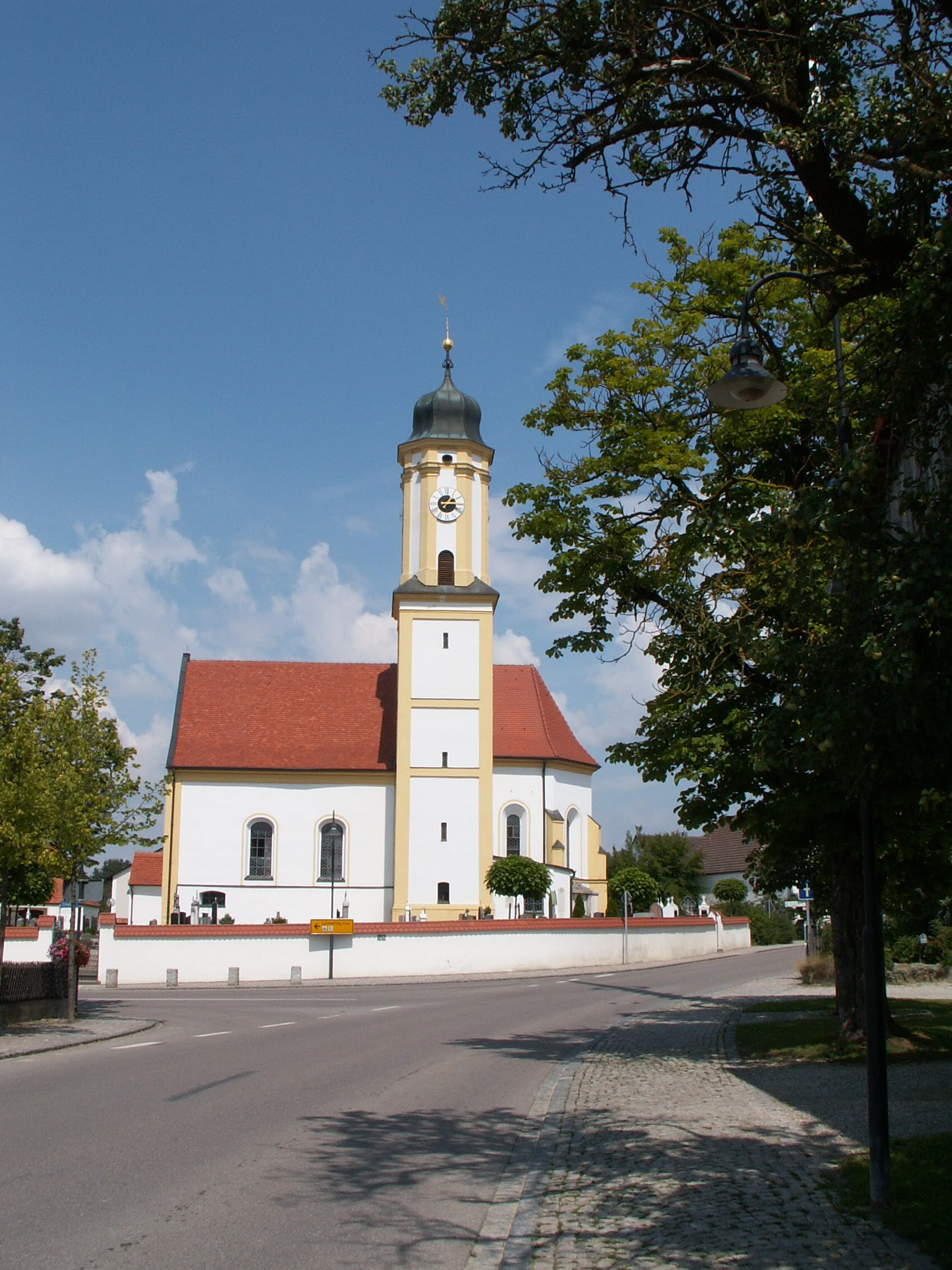 Kirche in Sielenbach, Lkr. Aichach-Friedberg